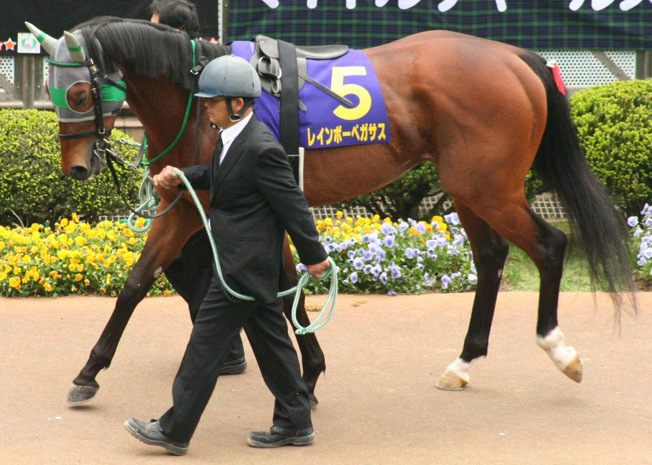 レインボーペガサス（中山競馬場 第68回皐月賞）